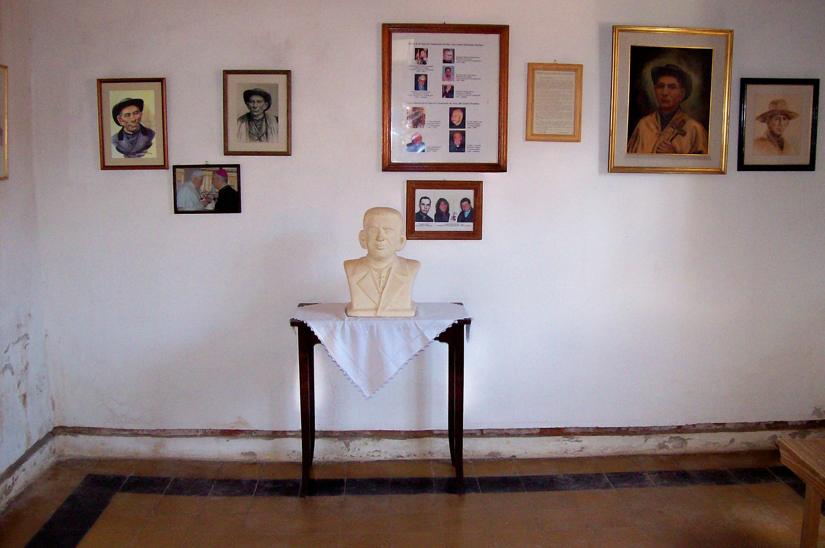 Habitación de la casa donde murió José Gabriel Brochero, actual museo, en la ciudad de Cura Brochero. Se observa un busto de él y varias imágenes del mismo.